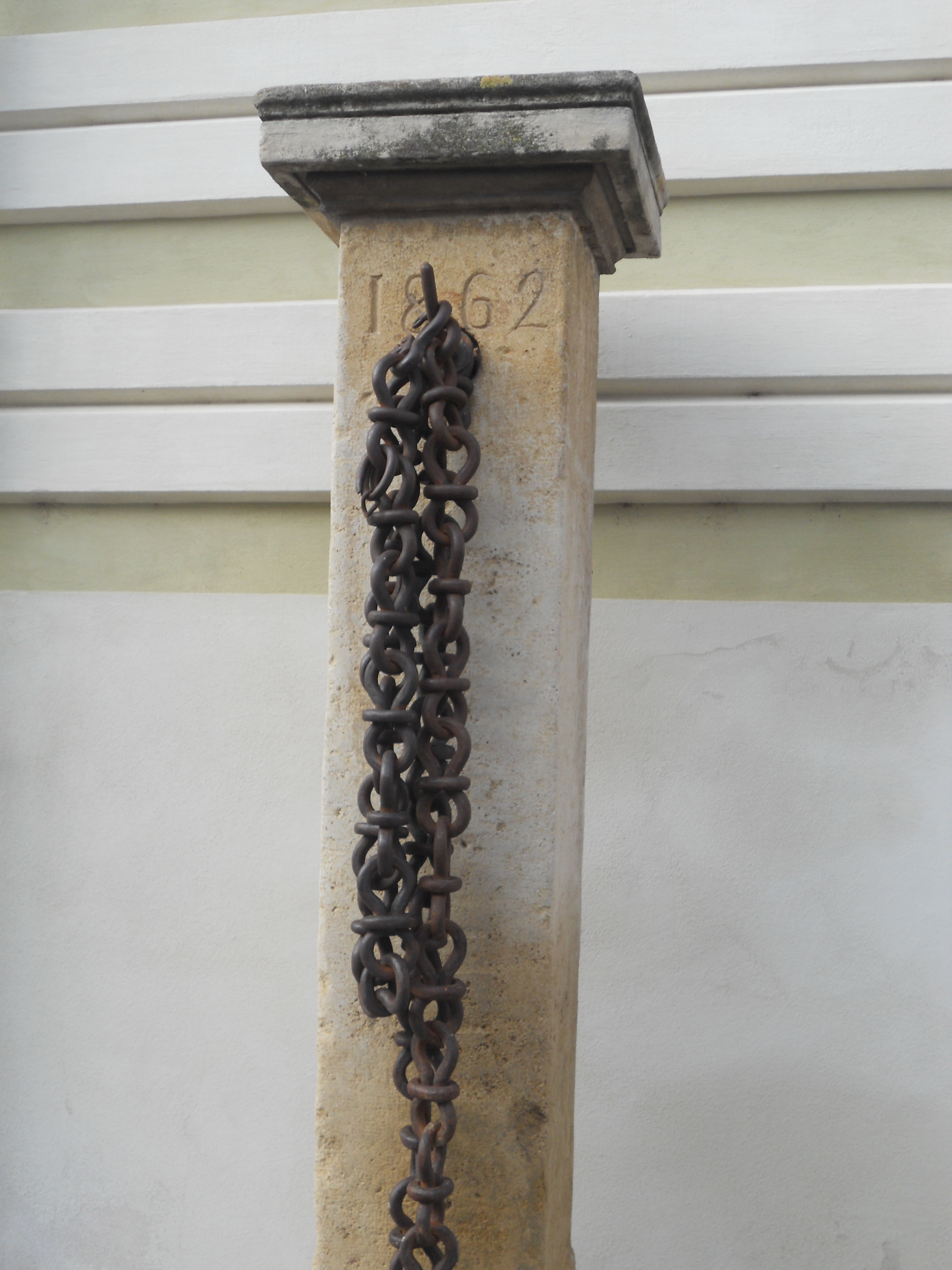 Bildstock, Ghettopfeiler